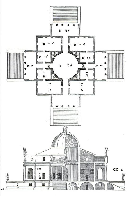 Abbildung 49 aus Andrea Palladio: I quattro libri dell’Architettura